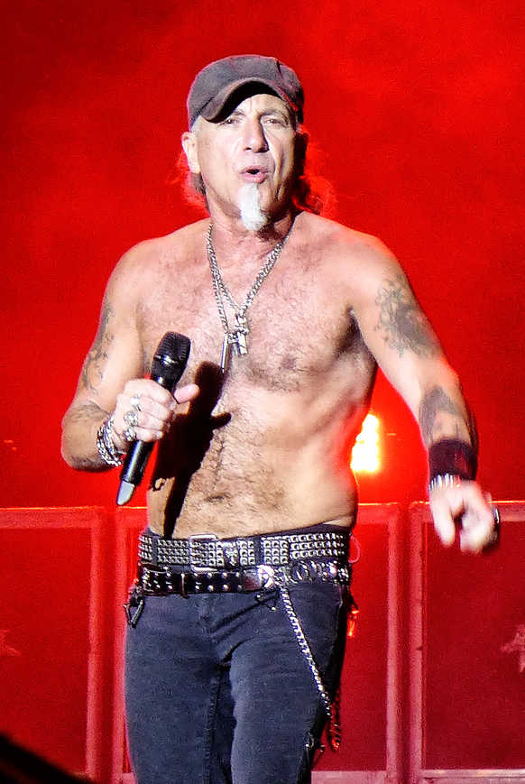 Accept, live RockFest Barcelona, 25/7/2015